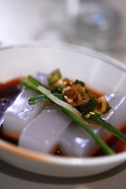 Cheongpomuk, Korean mung bean jelly